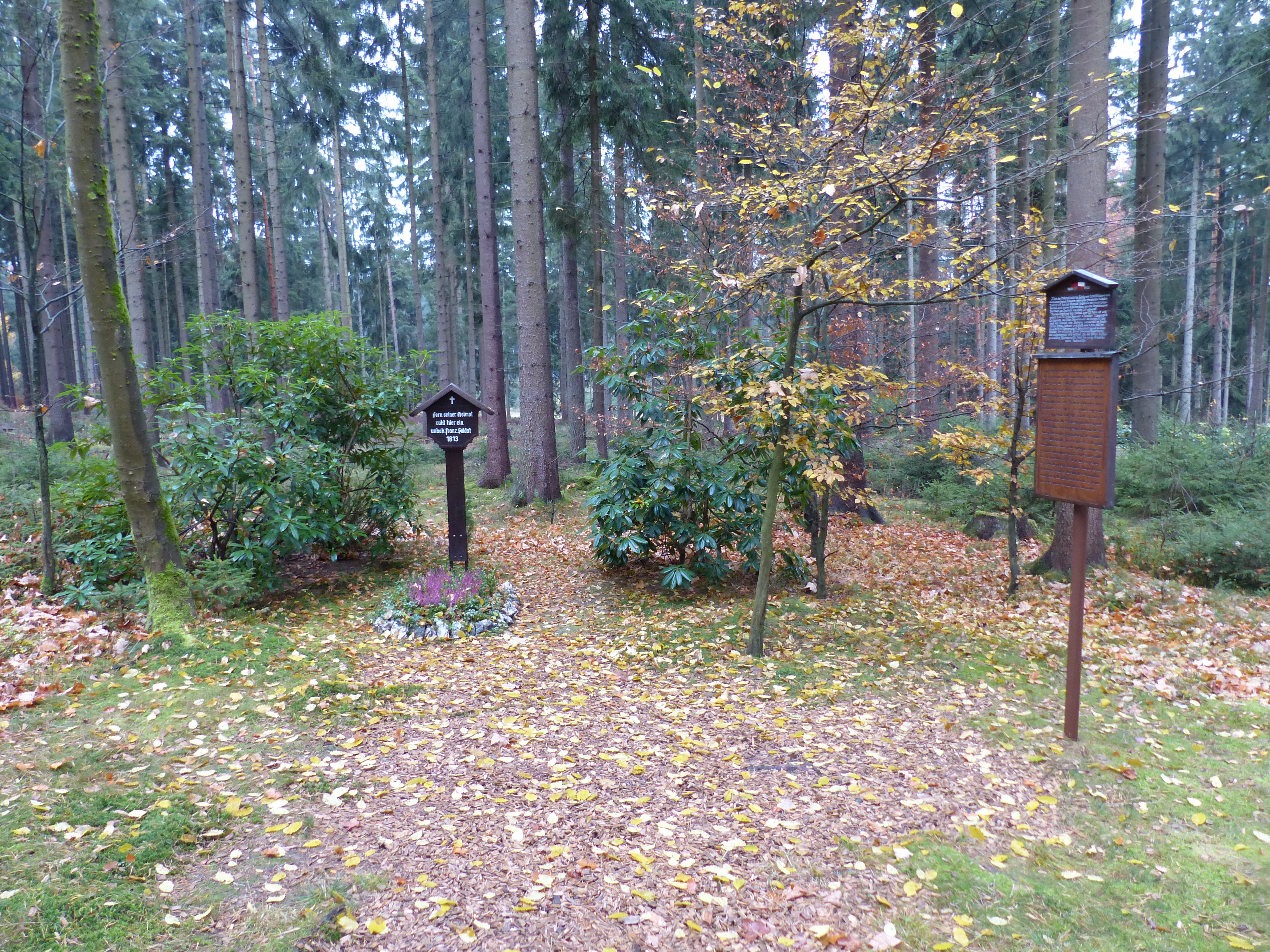 Franzosengrab auf dem Gebiet der Stadt Rehau